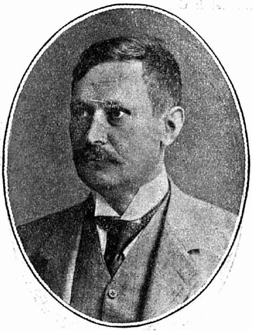 Dumitru Marinescu Bragadiru fiul - industriaş, România, 1910